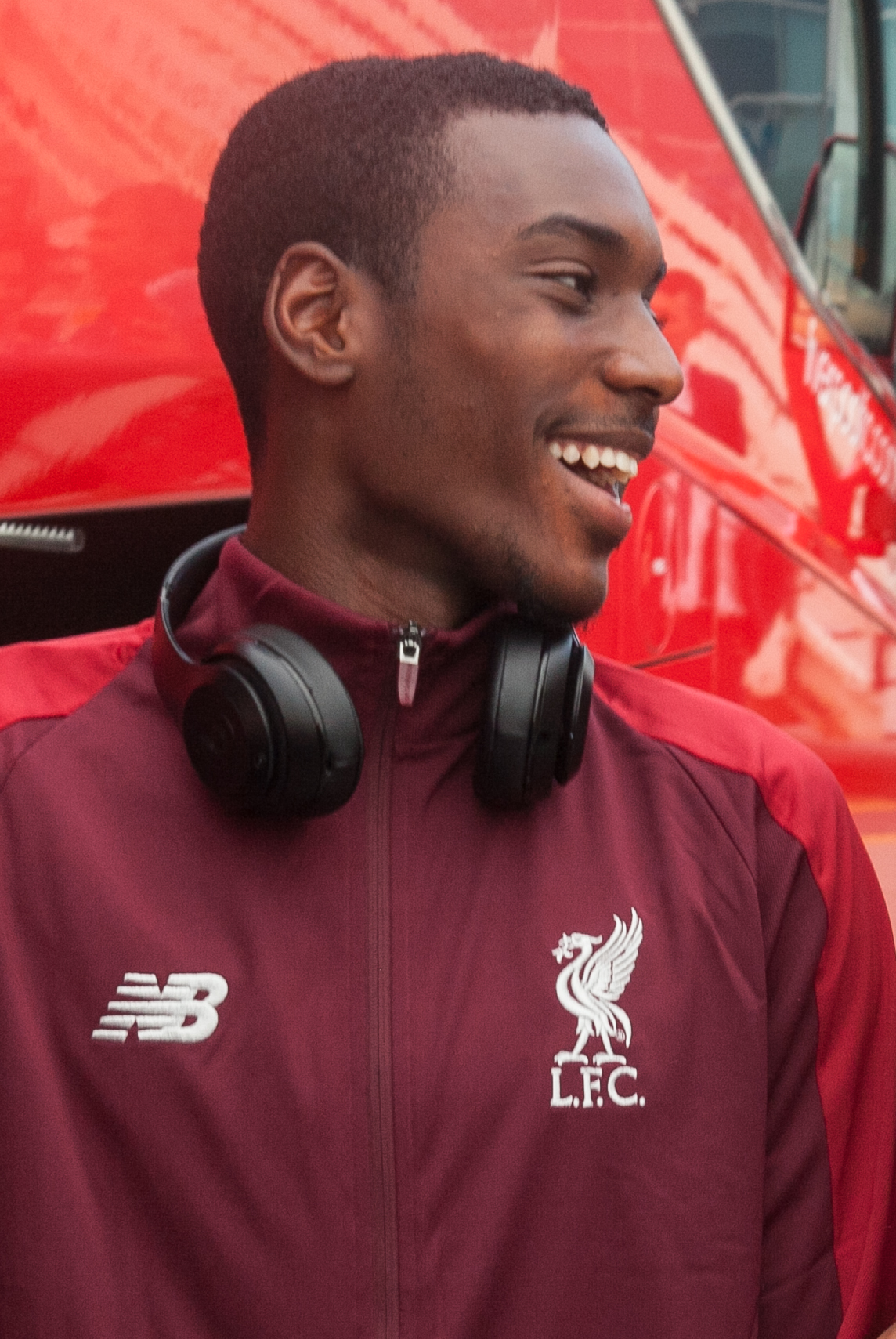 Команда ФК «Ливерпуль» прибыла в Киев, 2019